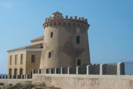 Torre Foradada, al municipi del Pilar de la Foradada